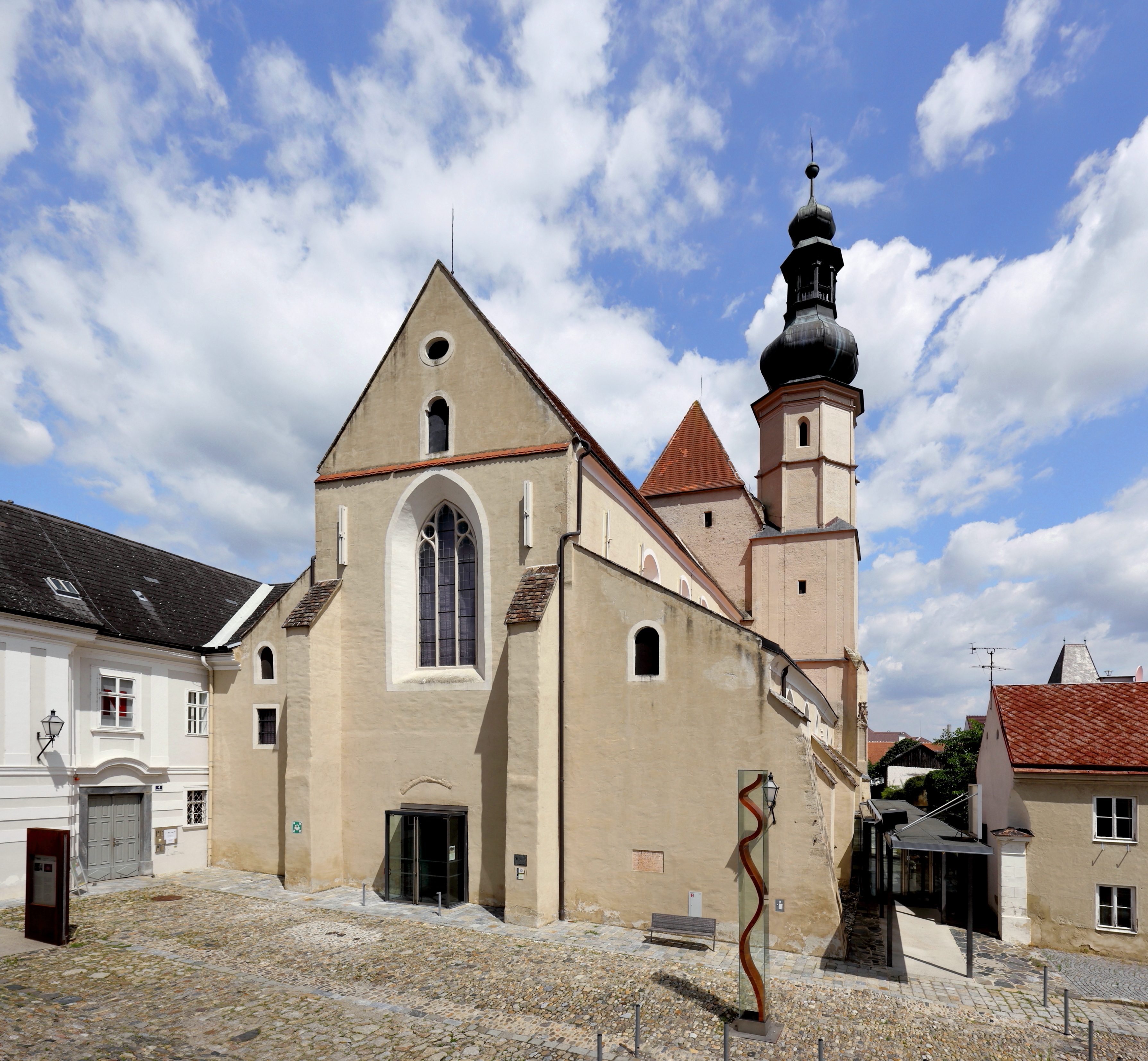 Südwestansicht der ehemaligen Minoritenkirche in Stein an der Donau, ein Stadtteil der niederösterreichischen Stadt Krems.Nachdem um 1223/24 die Minoriten in Stein ein Kloster gründeten, erfolgte 1264 die Kirchenweihe. Die spätromanische bzw. frühgotische dreischiffige Basilika hat einen höheren, einschiffigen gotischen Langchor, der vermutlich um 1330 gebaut wurde, und einen Südturm mit barocker Bekrönung, der um 1444 errichtet wurde. Zur Reformationszeit wurde der Kirchenbau bis 1577 als Salzdepot genutzt und 1592 erfolgte die Rückgabe an die Minoriten. Mit der Aufhebung des Klosters im Jahre 1790/96 wurde auch die Kirche profaniert und anschließend unter anderem als Tabakmagazin und Feuerwehrdepot verwendet. 1950/51 wurde die Kirche saniert und ab 1992 von der Kunsthalle Krems genutzt. Im Jahr 2002 erfolgte die Übernahme des Kirchenraumes durch die NÖ Festival und Kino GmbH und es fand anschließend bis 2004 eine neuerliche umfassende Renovierung durch den Architekten Fritz Göbl statt. Unter anderem wurde dabei auch südseitig ein neuer Zugangsfoyer errichtet. Die Kirche wird nun als „Klangraum Krems“ vermarktet.